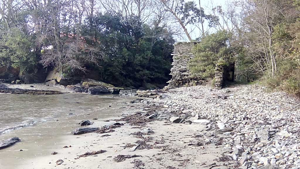 O río Castro na ría de Ares.